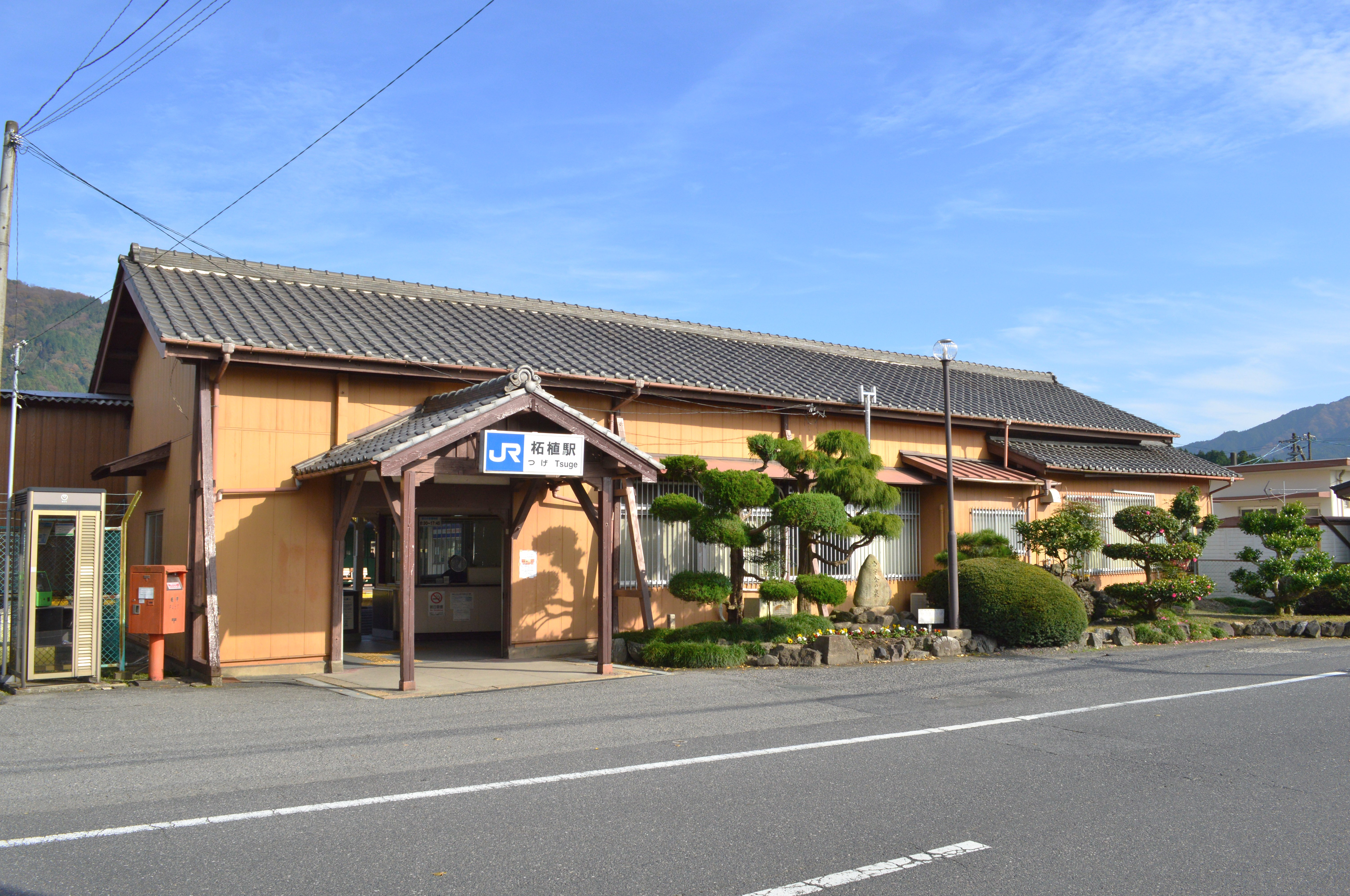 柘植駅 駅舎